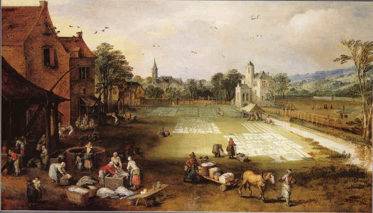 Was ligt te drogen op een bleekveld